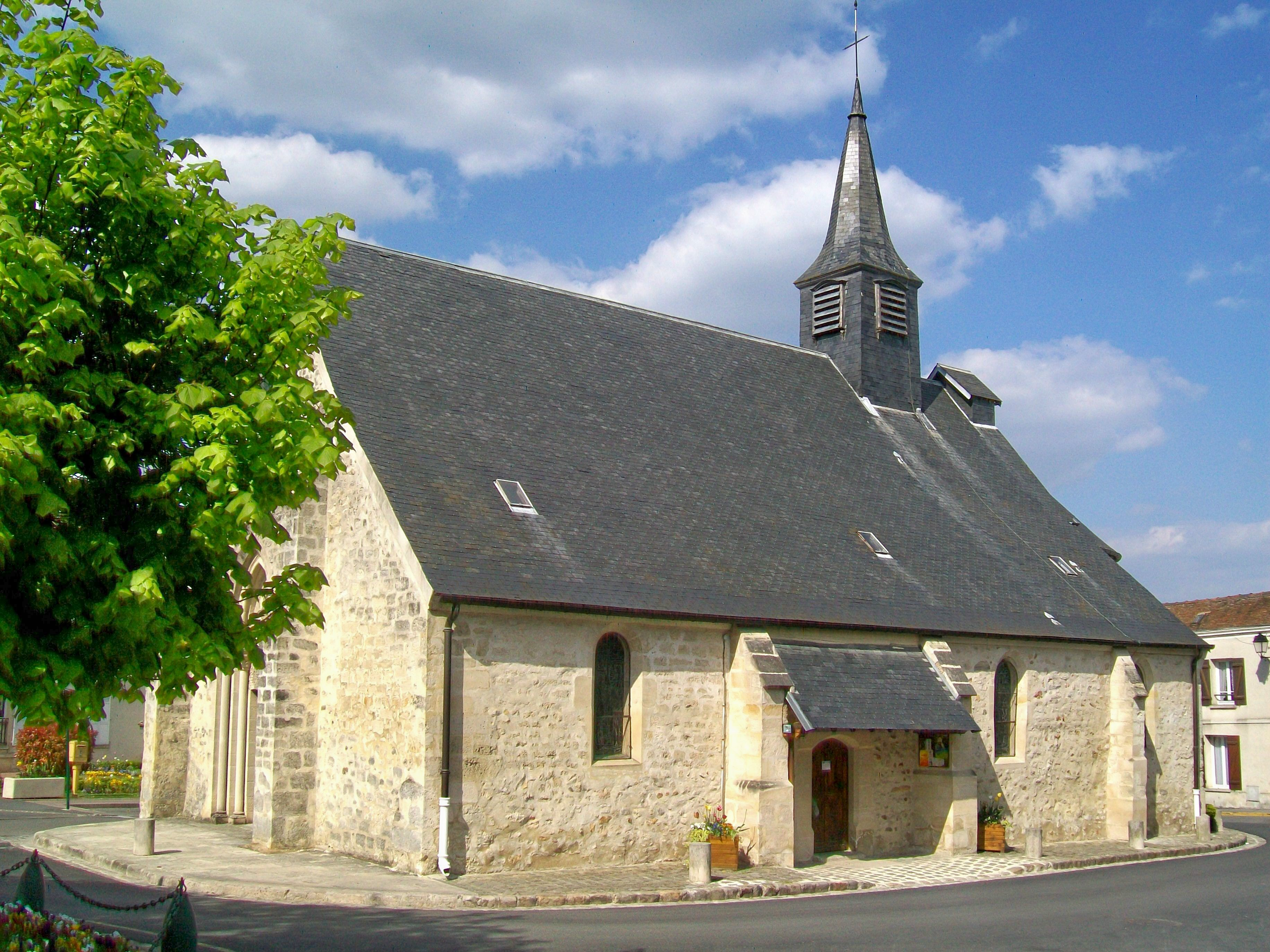 Façade sud de l'église d'Orry-la-Ville.